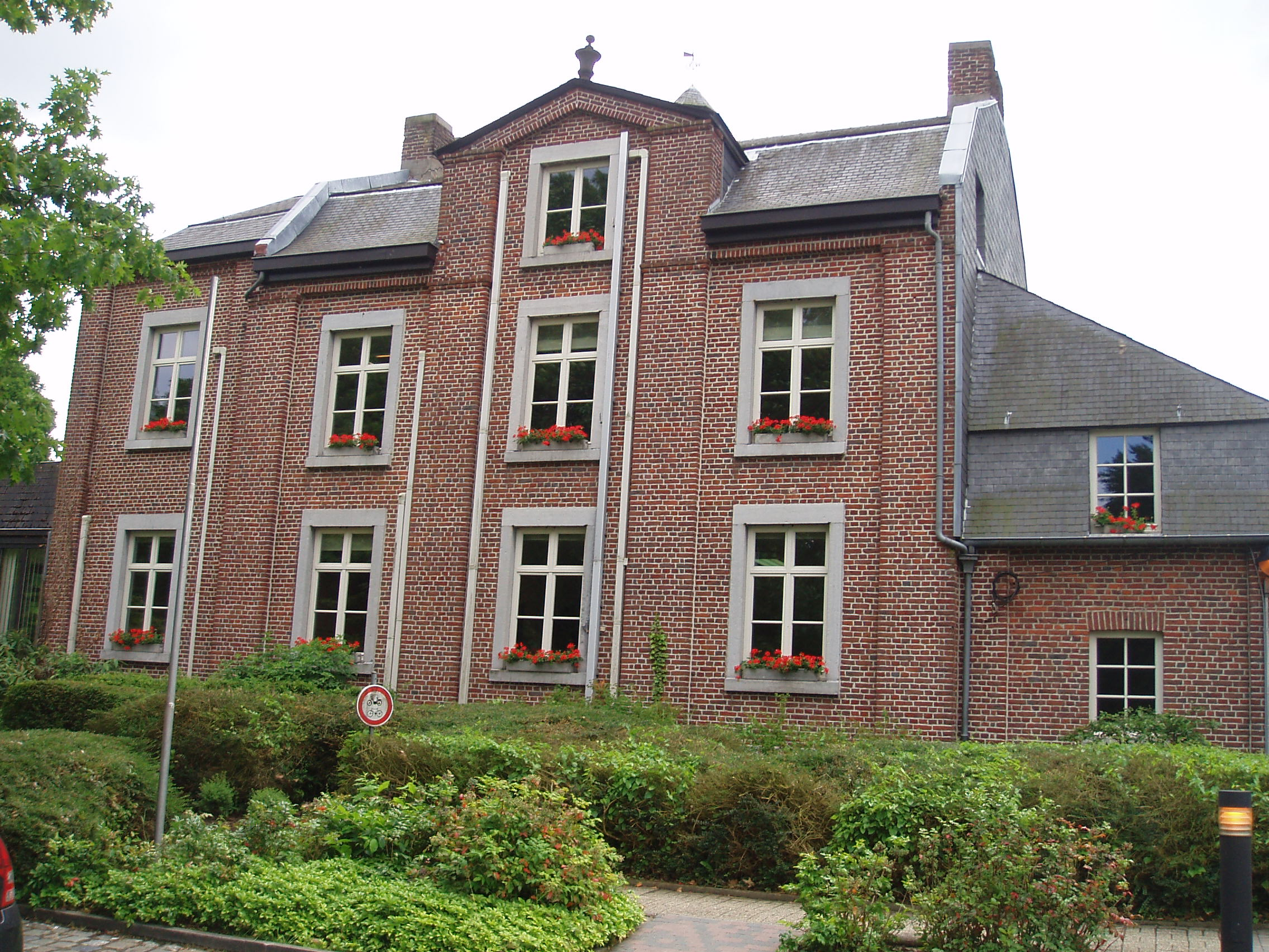 Kasteel de Pierpont - achterzijde 2013